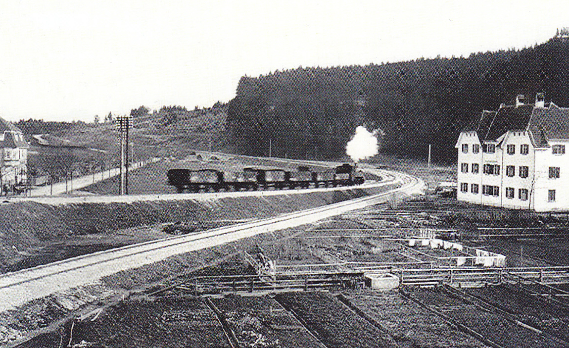 Erster Güterzug auf dem erst 1912 fertiggestellten Gleisanschluss vom Bahnhof Schongau zur Papierfabrik Haindl. Das Gleis links hinten führt zum Bahnhof Schongau, das Gleis links vorne zur Paierfabrik, die Fahrt erfolgte über eine Spitzkehre. 1917 wurde das Gleis vom Bahnhof in die Spitzkehre Teil der Bahnstrecke Schongau–Peißenberg